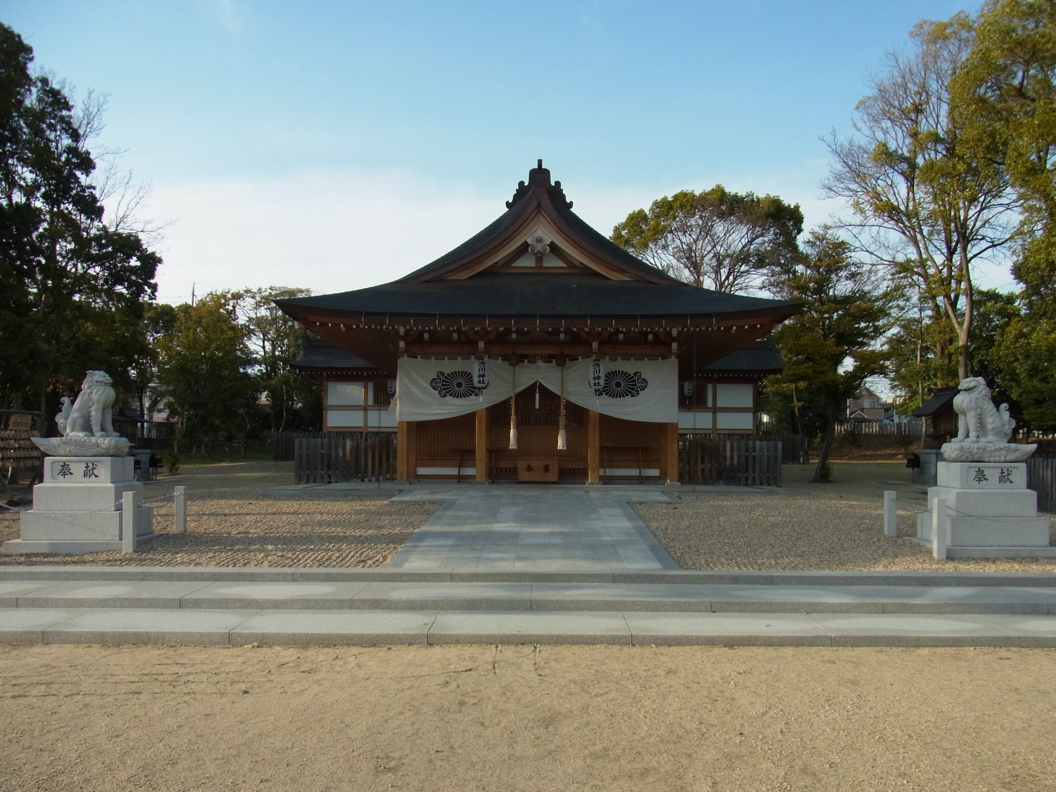 渋川神社拝殿